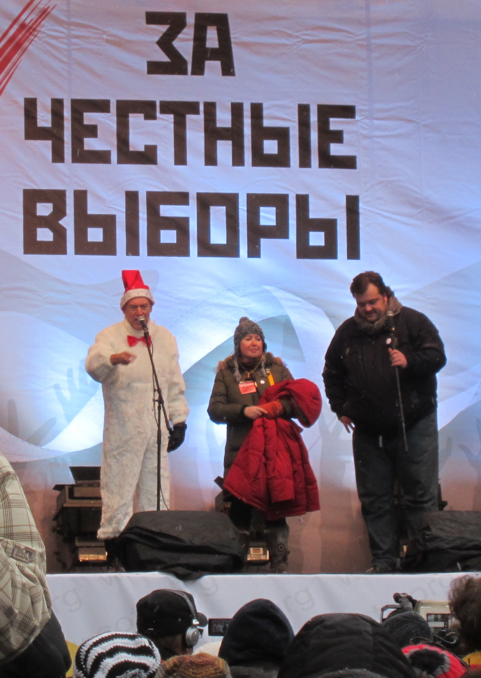 Митинг 24 декабря на проспекте Сахарова; (слева направо) Артемий Троицкий, Ольга Романова, Василий Уткин